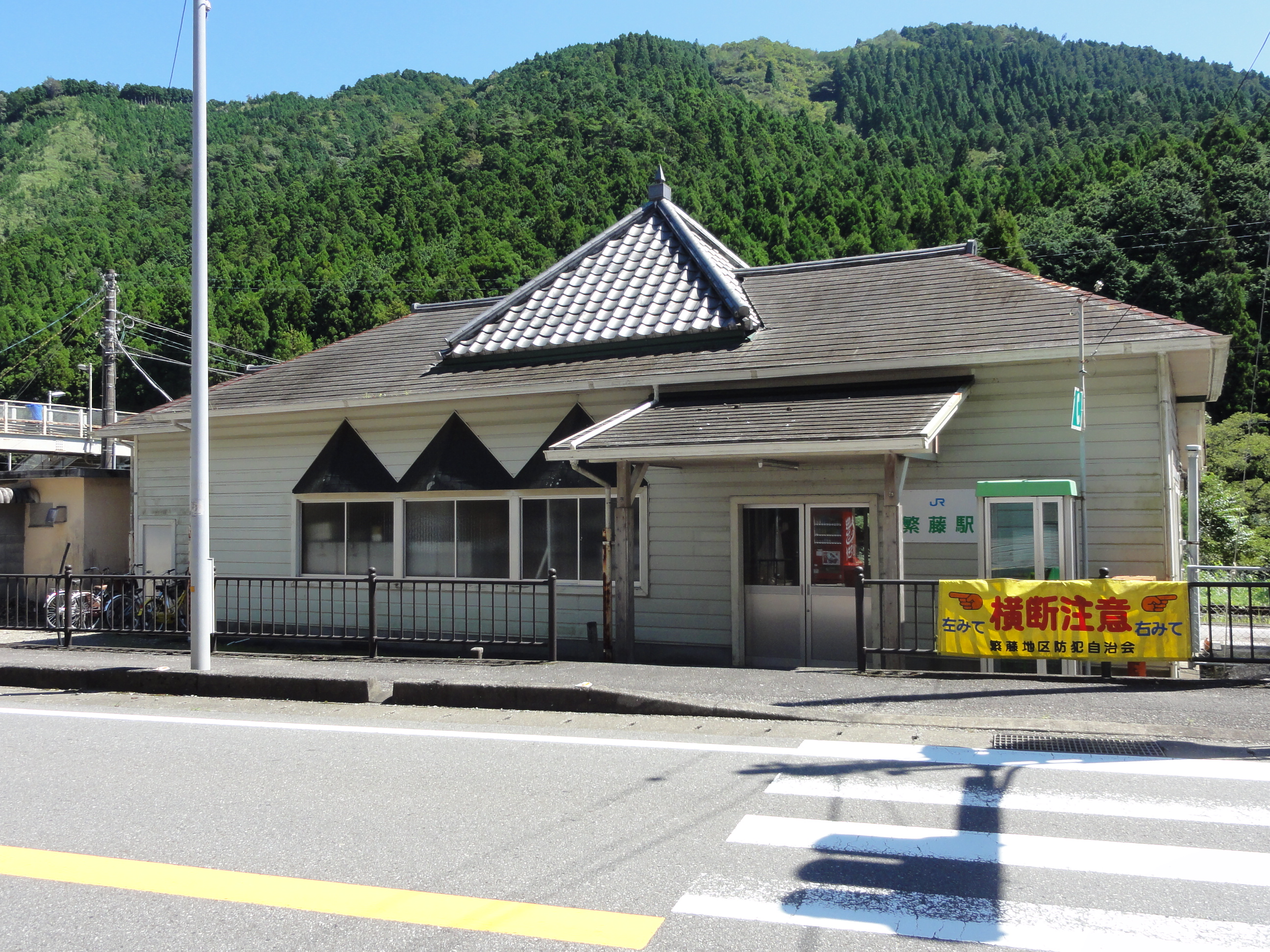 繁藤駅